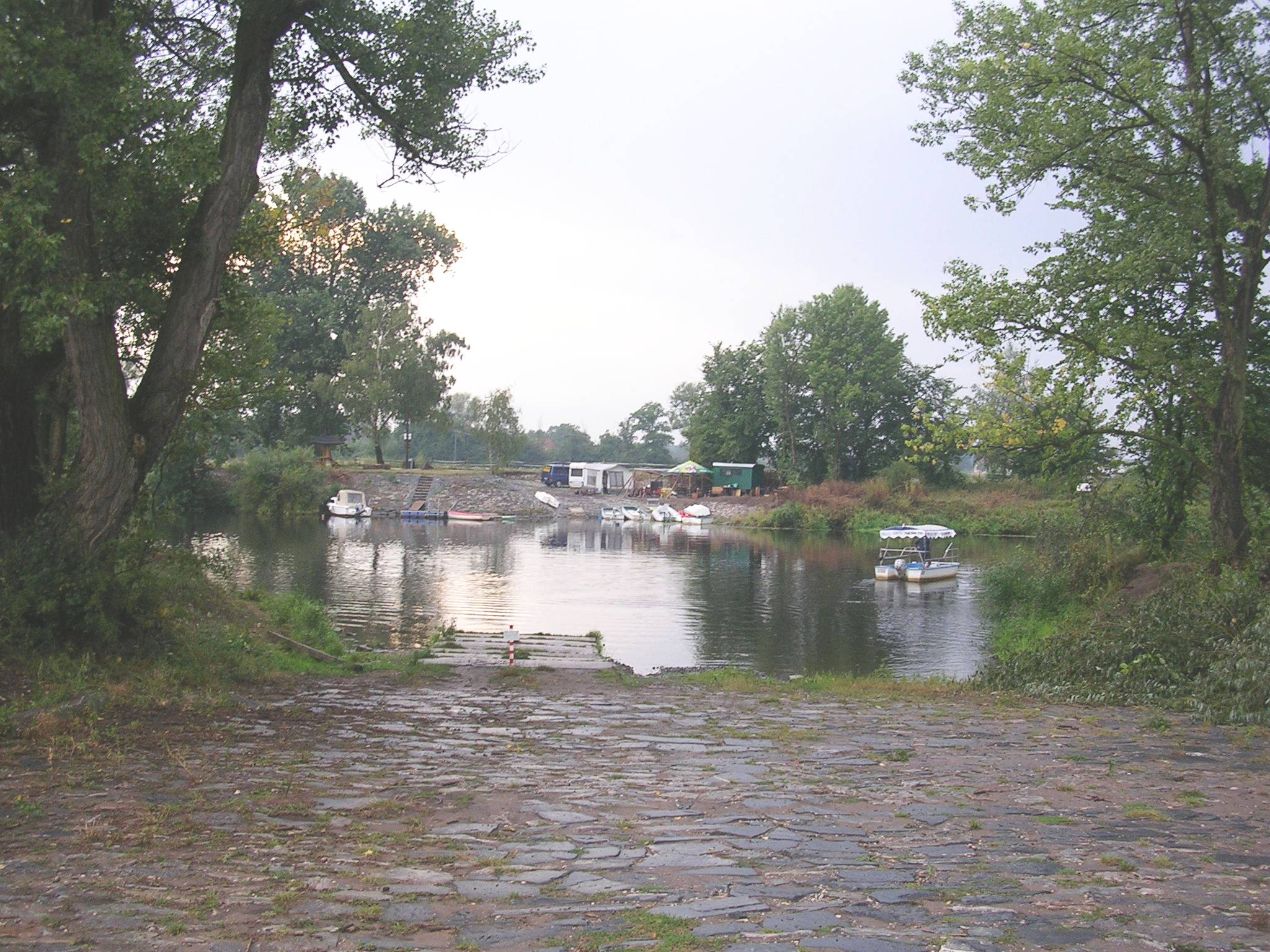 Přívoz Oseček (u Poděbrad), pohled z východního břehu.